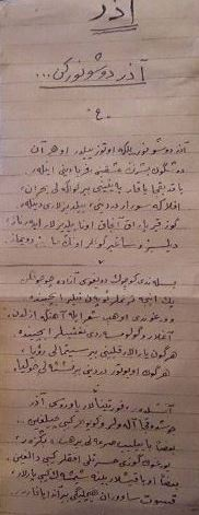 Aymar aru: "Azər düşünərkən". Hüseyn Cavidin ən son üzərində işlədiyi "Azər" poemasından bir parça.